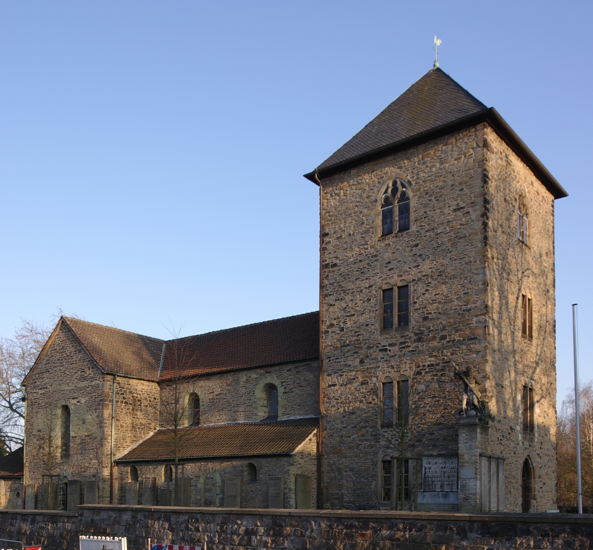 Denkmalgeschützte Kirche St. Georg in Dortmund-Aplerbeck.